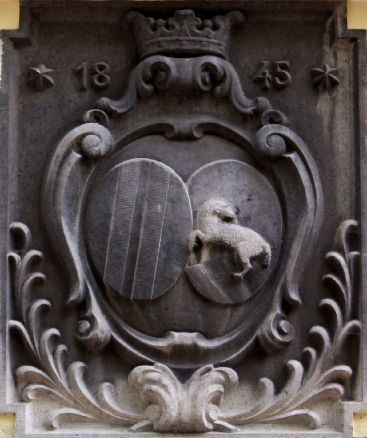 Roisdorf Villa Wittgenstein, Allianzwappen der von Wittgenstein und von Schaaffhausen. Bauherren der Villa um 1845